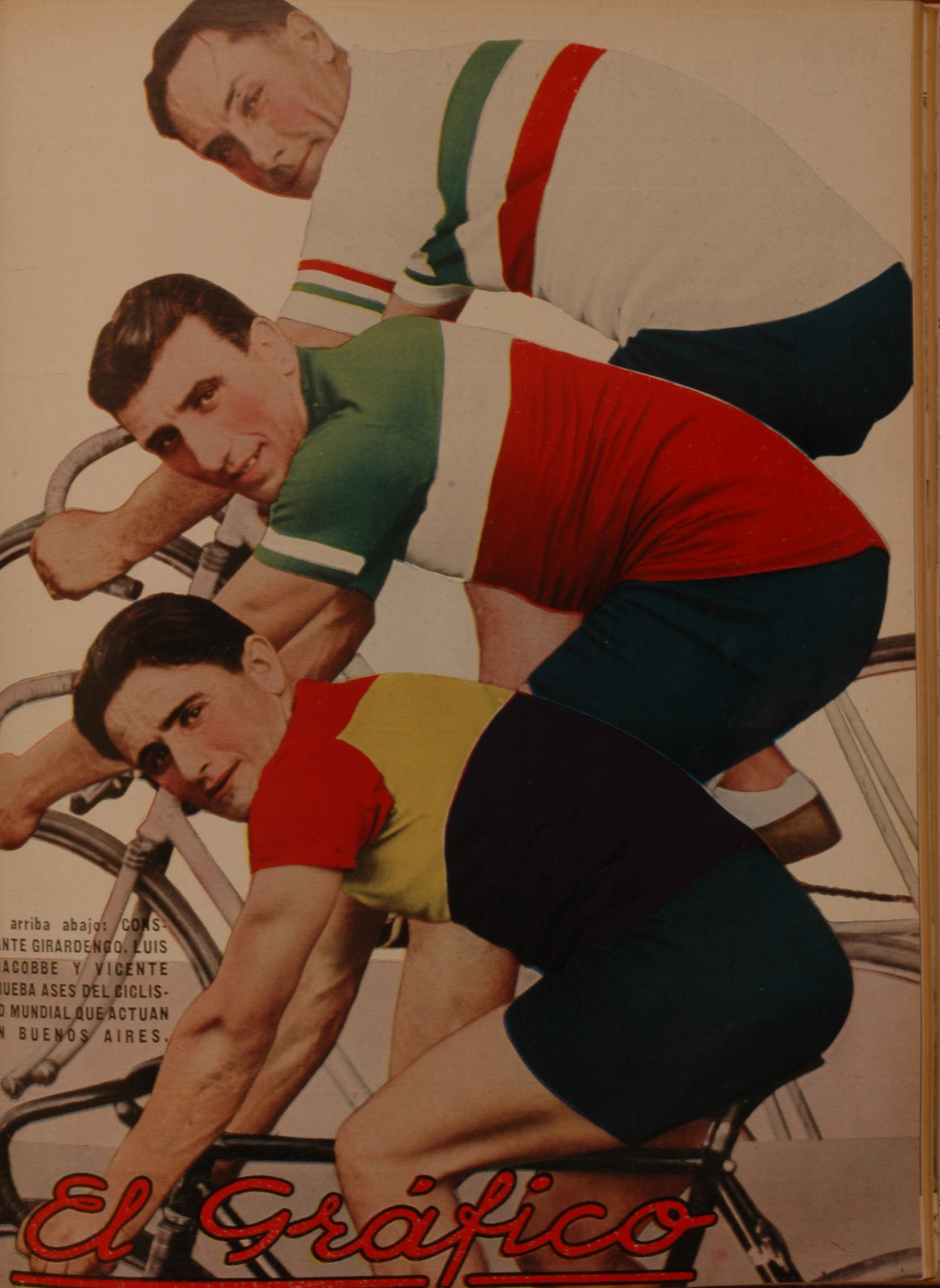 El Grafico del 27 de Enero de 1934. Edicion 759